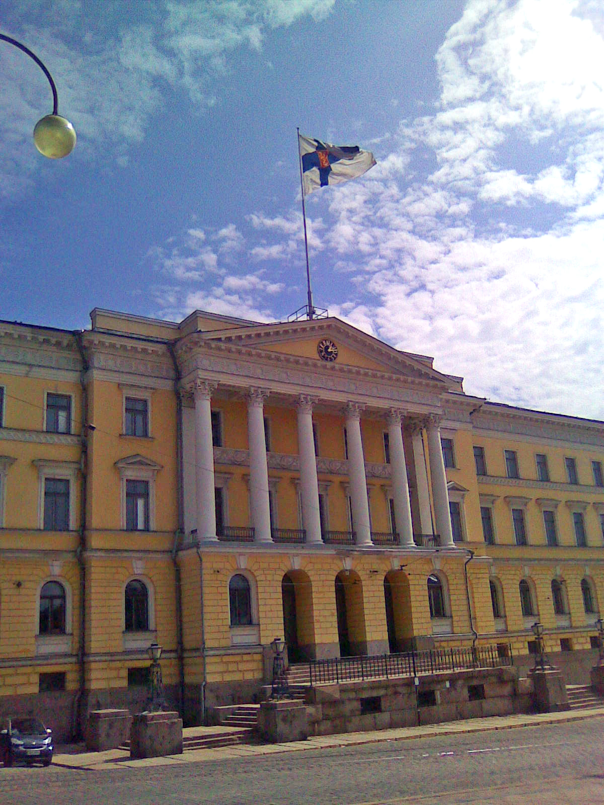 Valtioneuvoston linna Helsingissä Senaatintorin laidalla